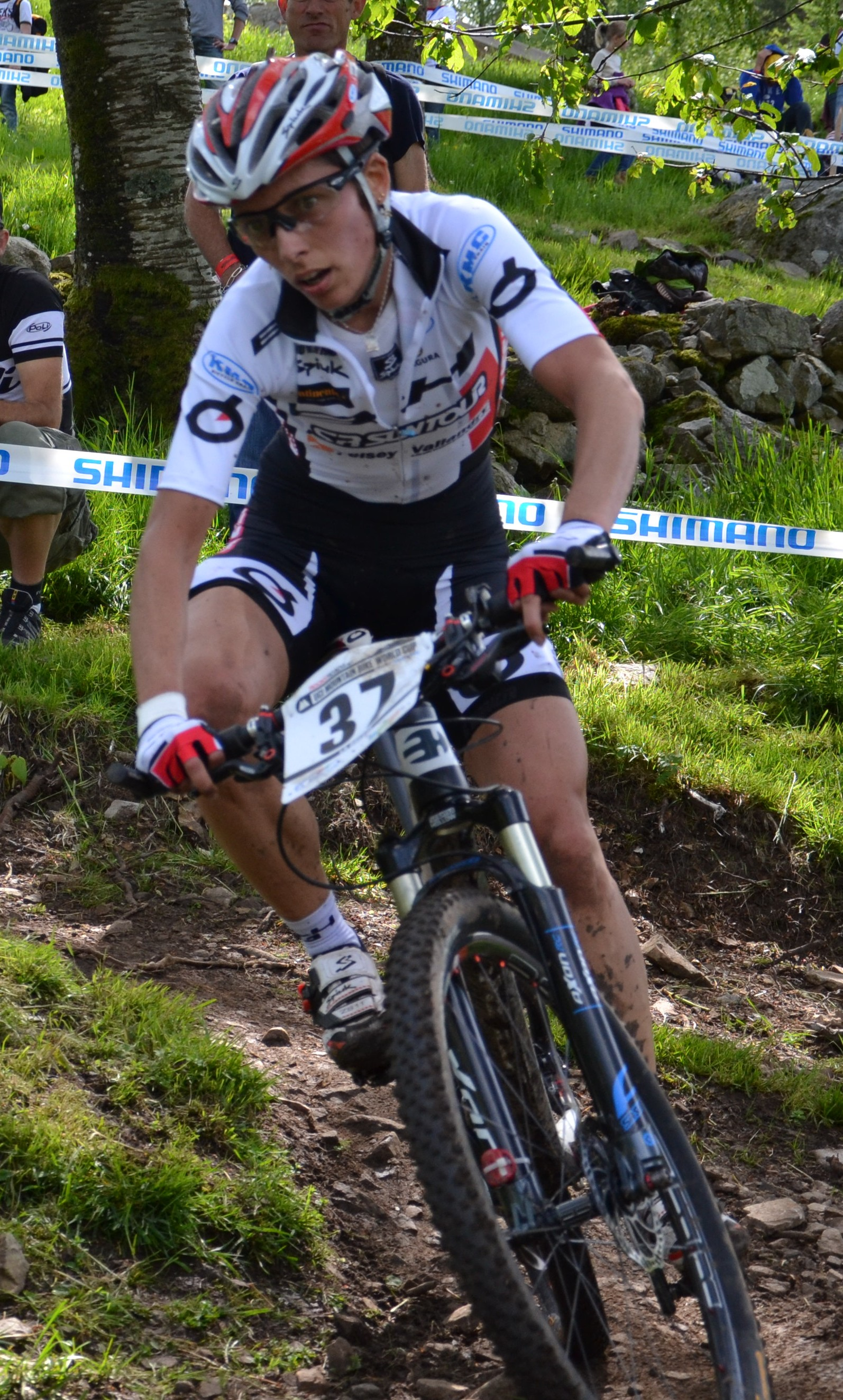 Lucie Chainel-Lefèvre lors de la 4e manche de la coupe du monde de VTT 2012 à La Bresse (FRA).